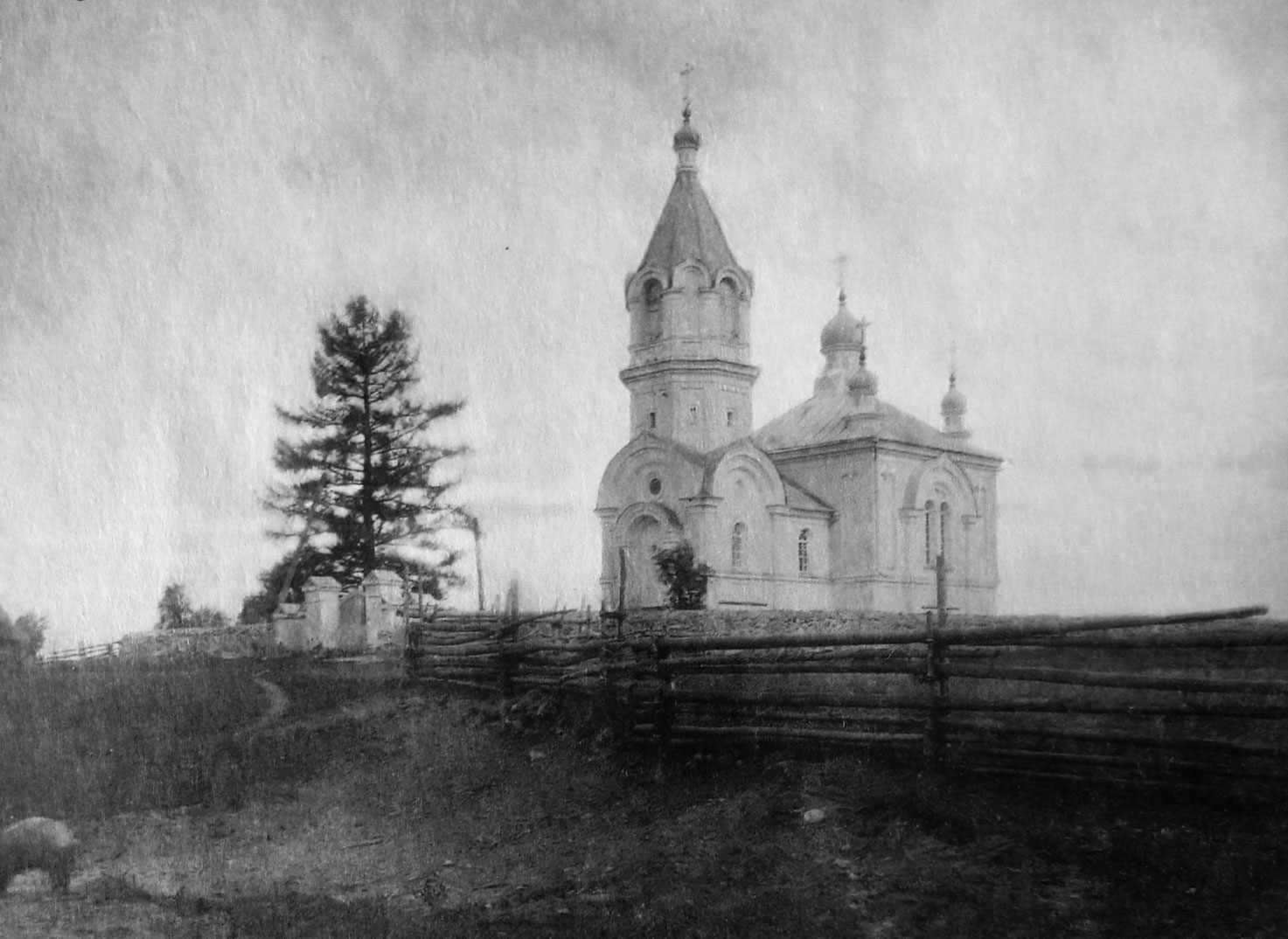 Беларуская (тарашкевіца): Вязавец (Viazaviec). Царква-мураўёўка